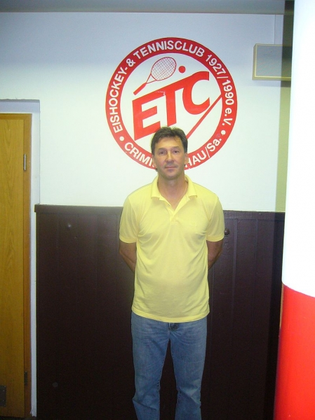 Sergej Svetlov